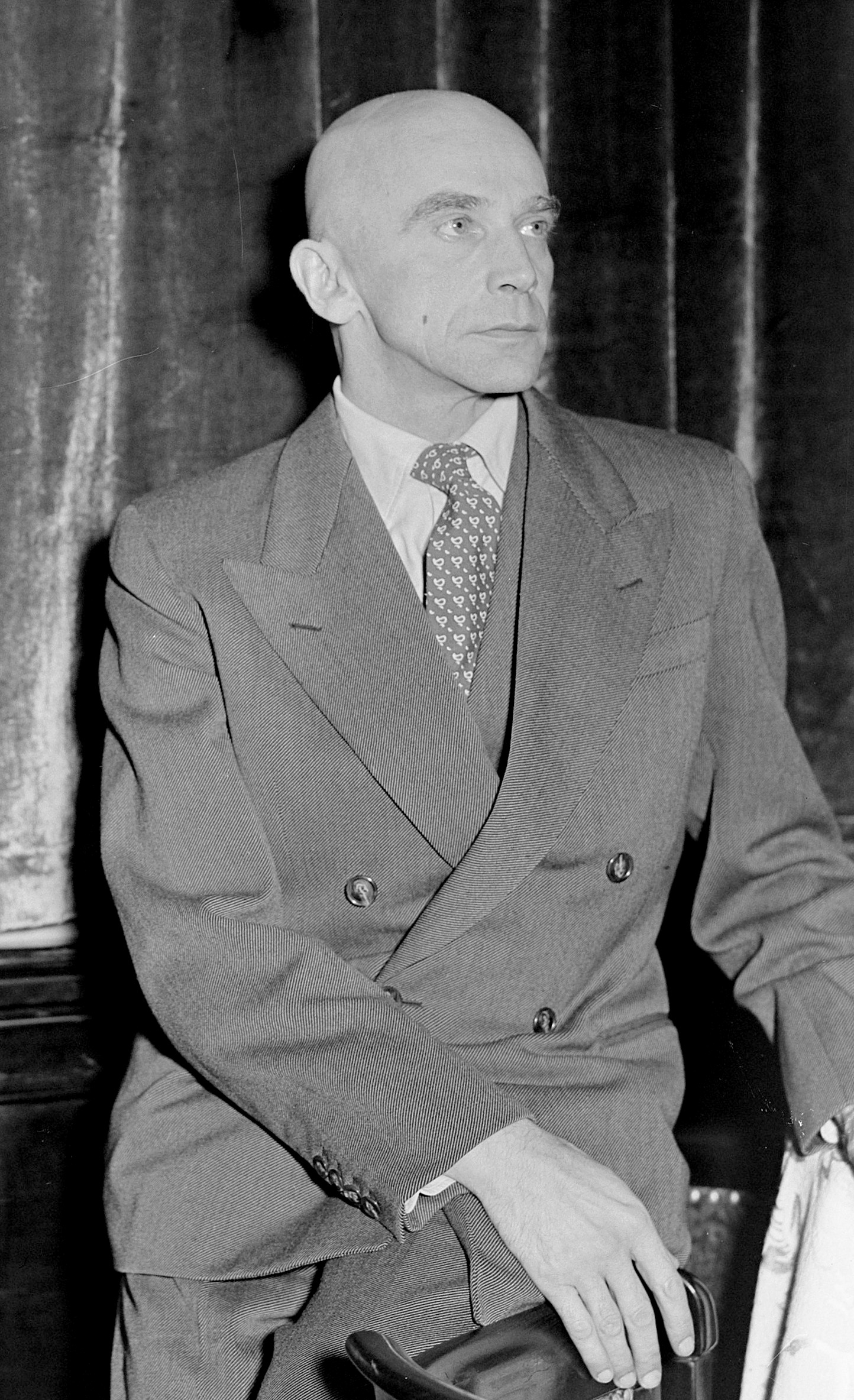 Aankomst van Harald Kreutzberg op het Centraal Station te Amsterdam